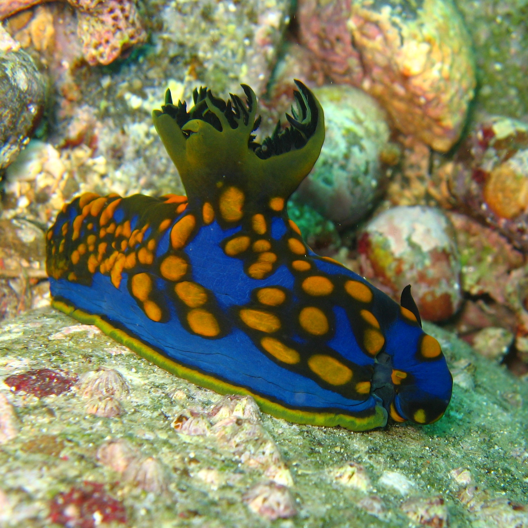 Tambja sagamiana in Kashiwajima Kohchi-ken(Prefecture), Japan